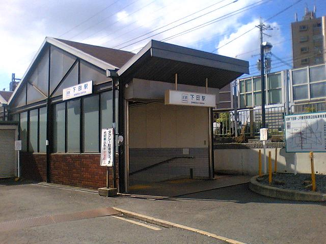 2007年6月23日 近鉄下田駅北出口。投稿者自身が撮影)